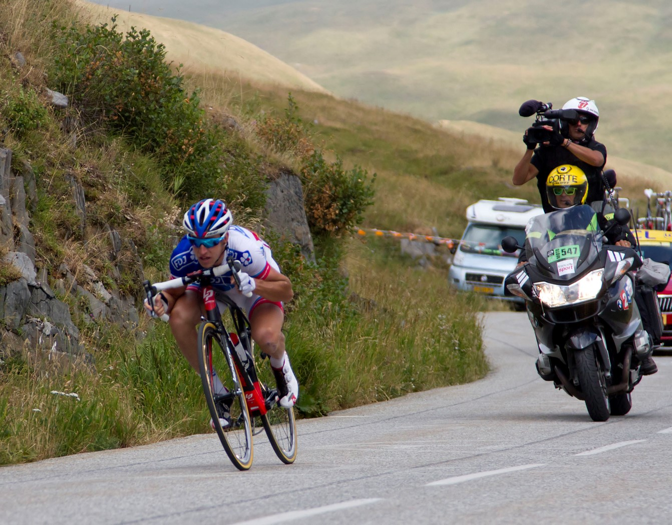 260 geniez